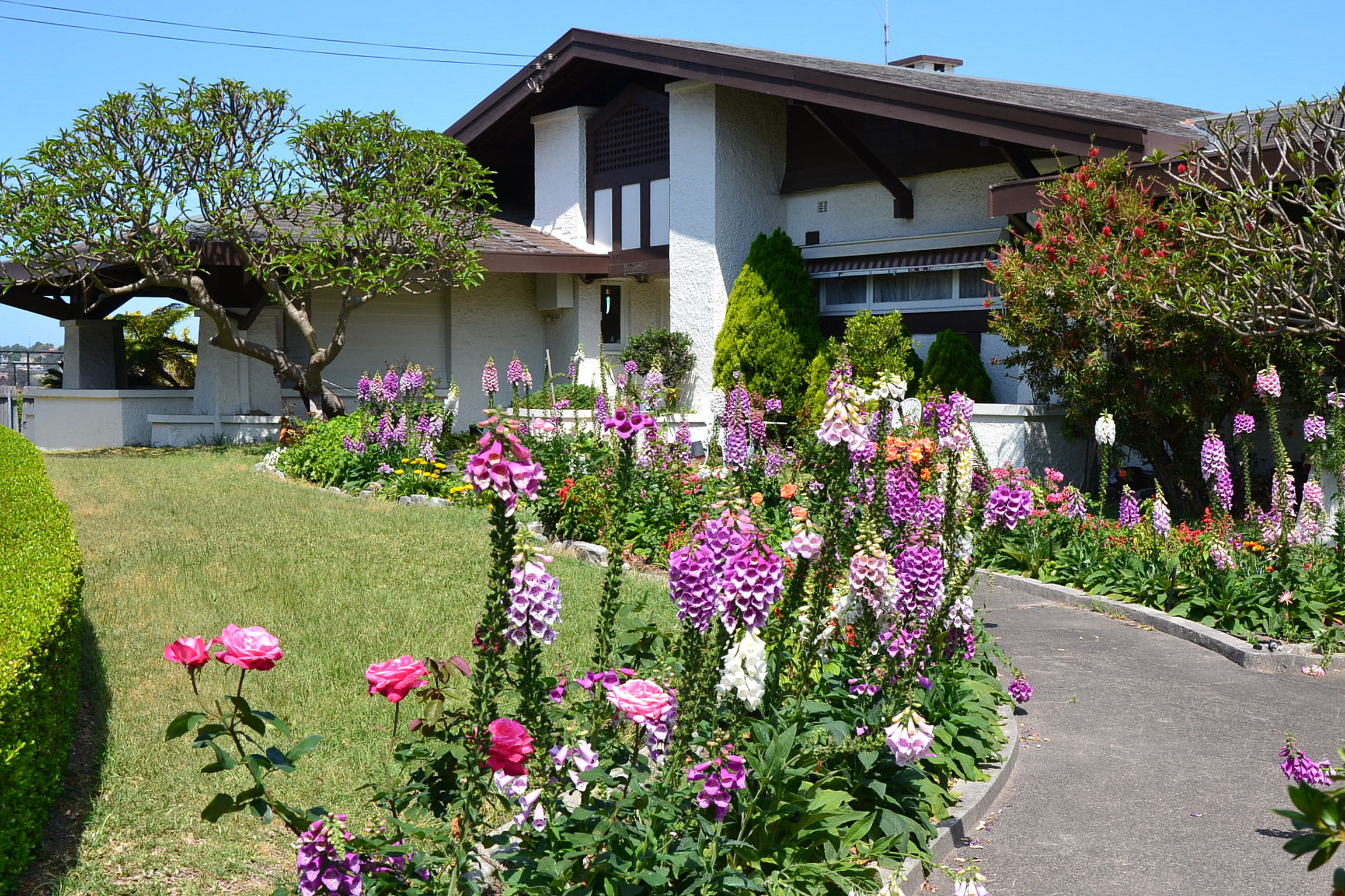 Belvedere, Cremorne, Sydney